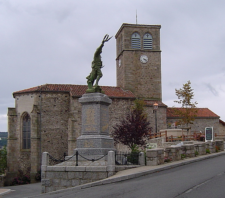 Eglise et monument aux morts de St Georges en Couzan